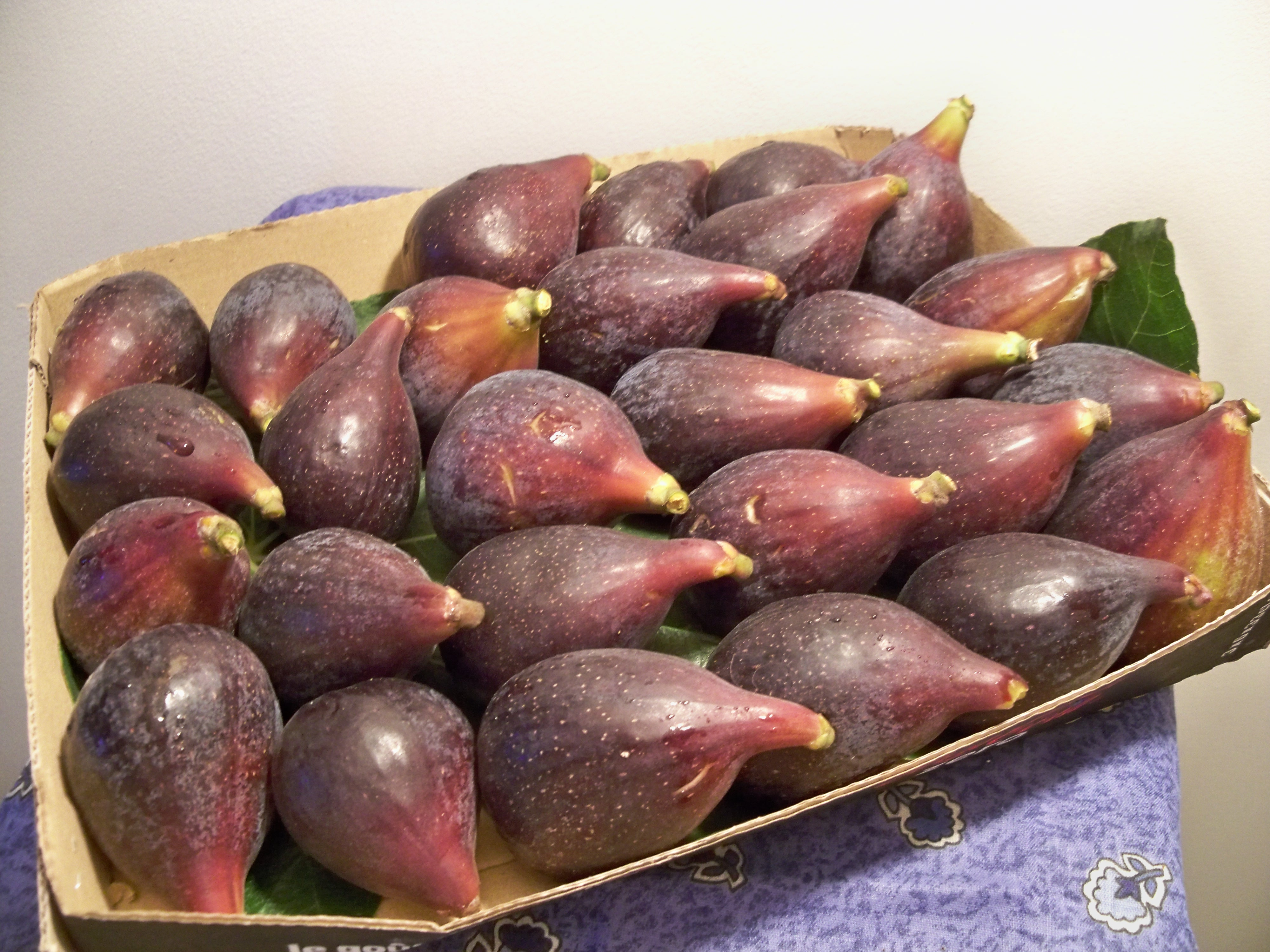 Plateau de figues longues noires de Caromb (Vaucluse, France)